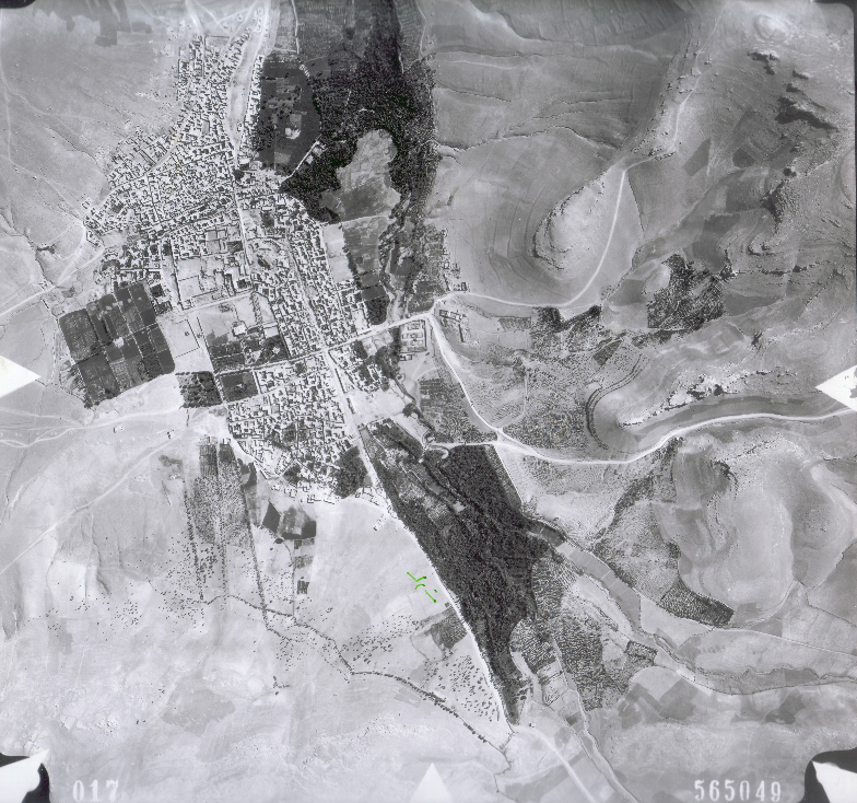 تۆرکجه: بایجار شهرین هوایی شکیلی 1335 جی ایلده سالینیب دیر